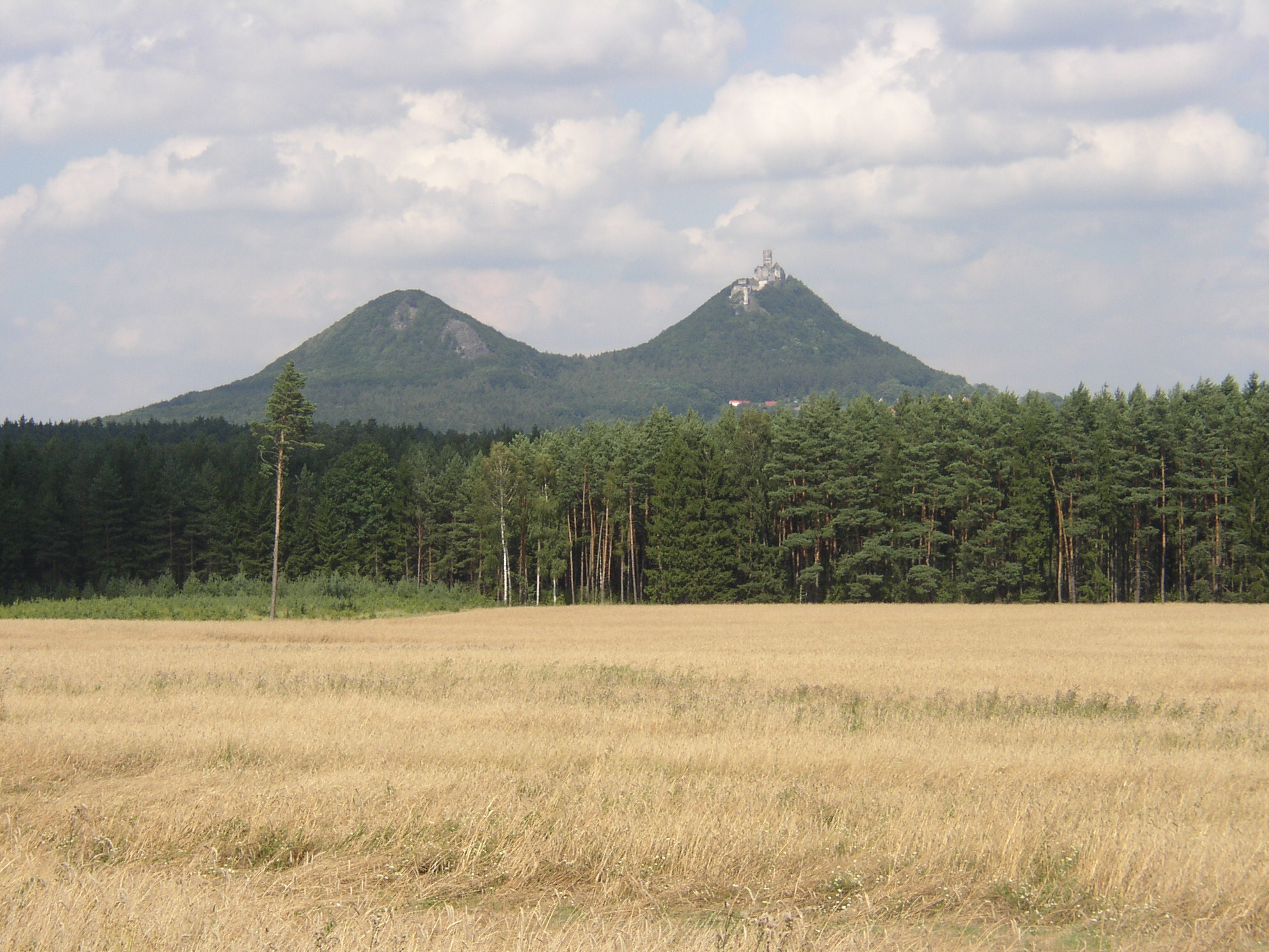 Burg Bezděz, Czech republic